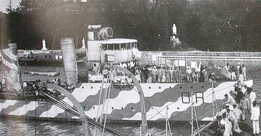 Il cacciatorpediniere Vincenzo Giordano Orsini.